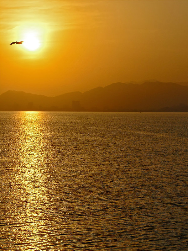 Lecherías al Amanecer